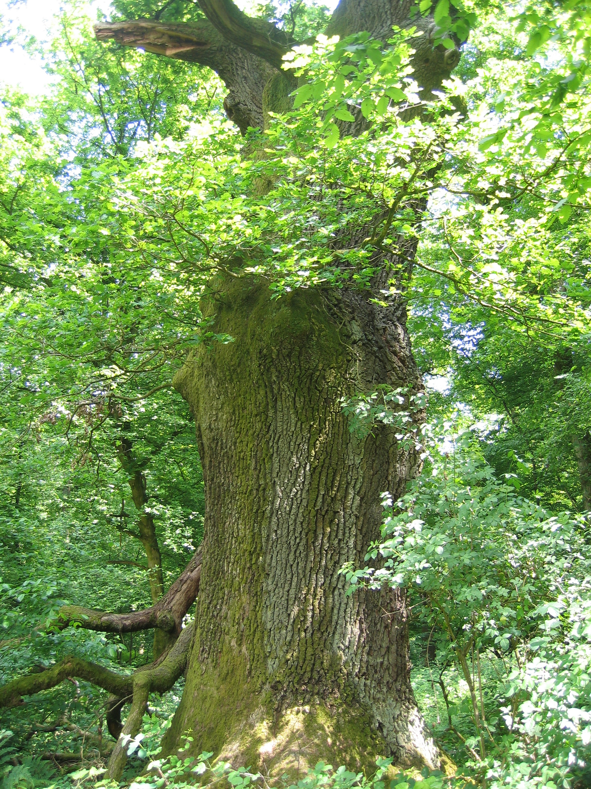 Wahner Heide, Landschaften, Mai 2008